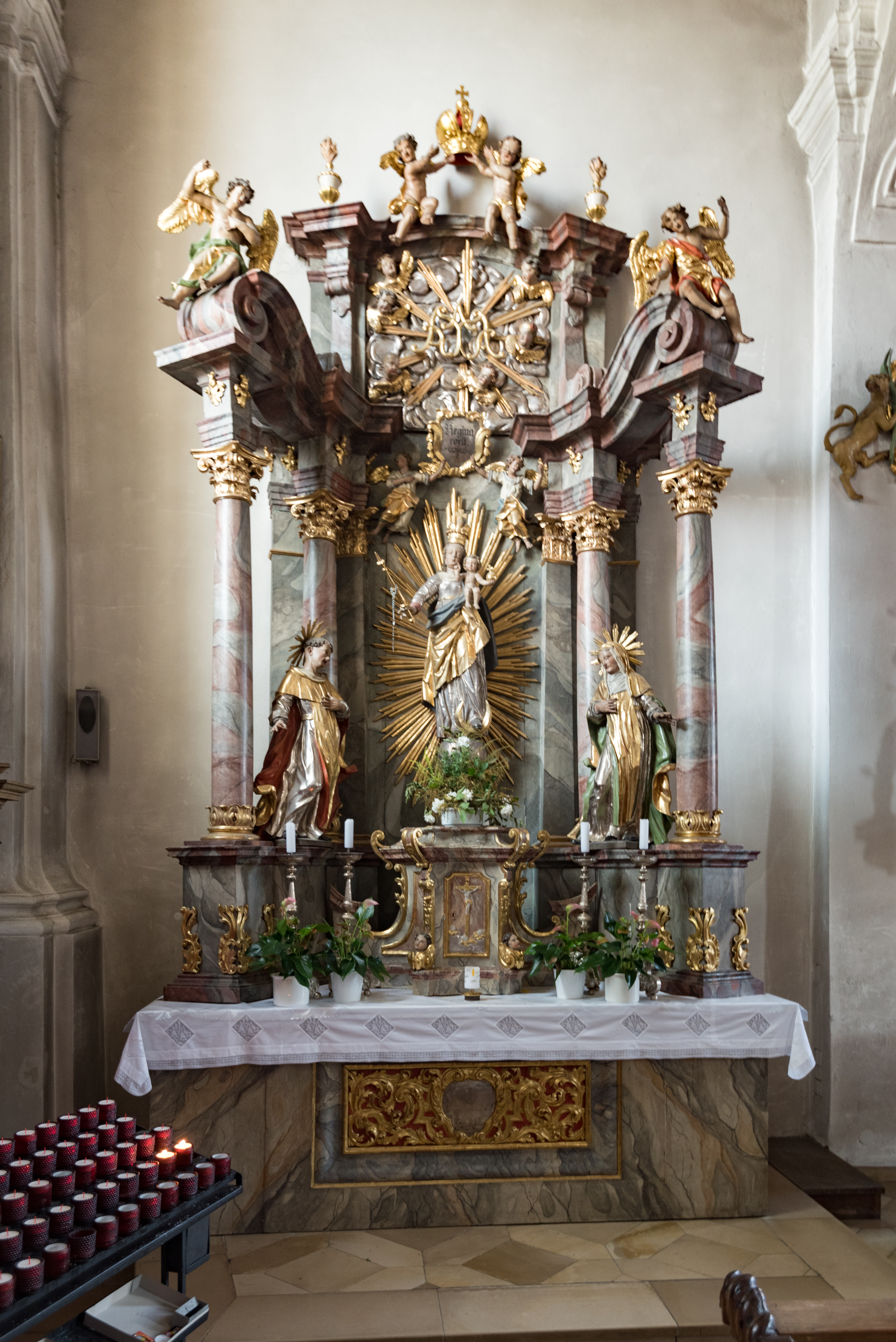 Velburg, Burgstraße 7, St. Johann Baptist